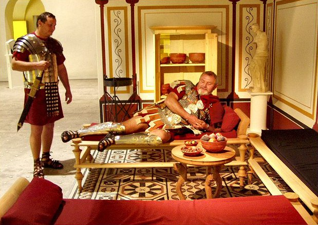 Stadtmuseum Wels: Archäologische Sammlung im ehemaligen Minoritenkloster - Römisches Speisezimmer